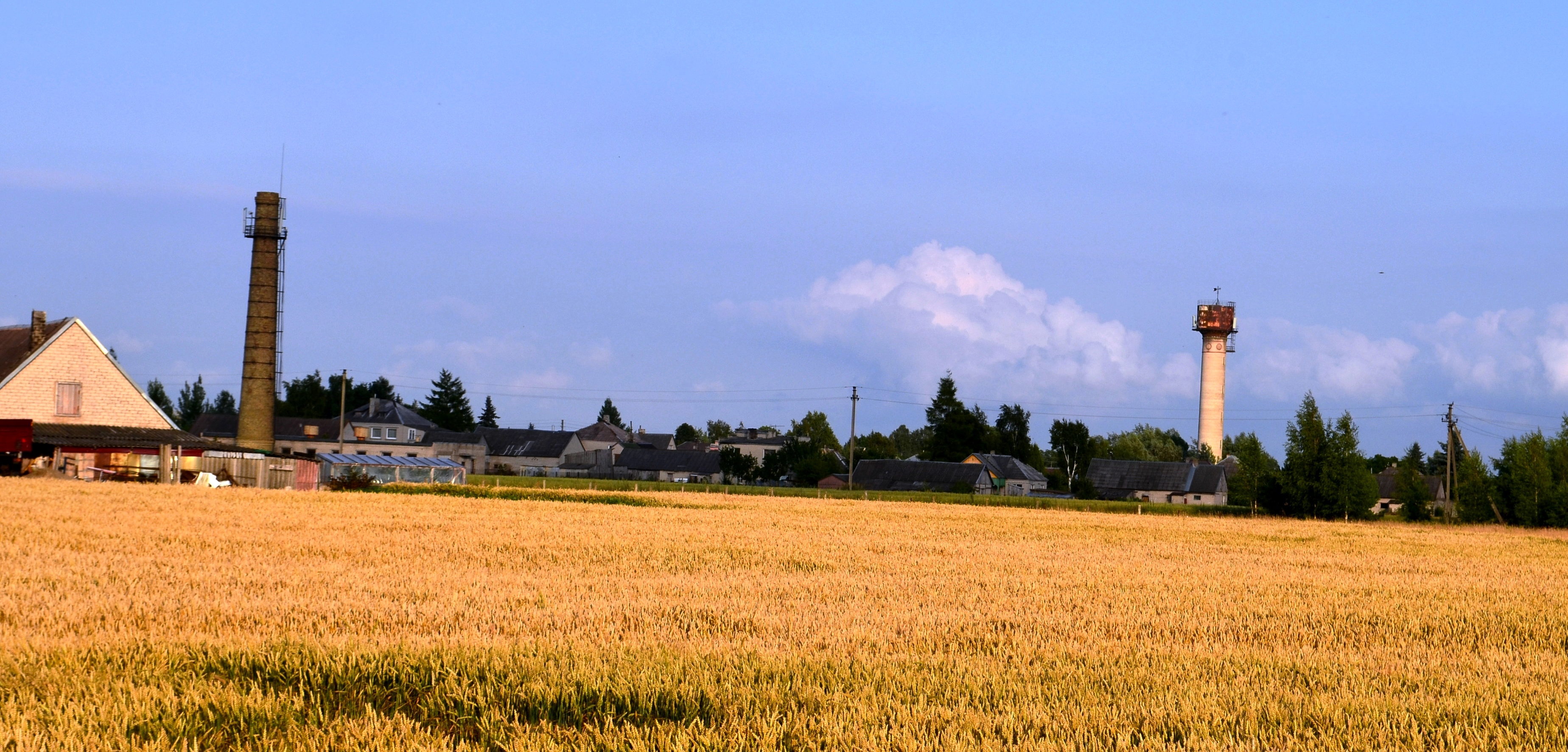 Aušra, Kėdainių r.